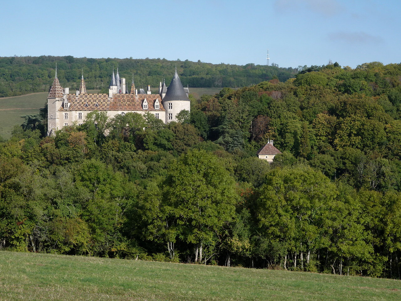 Façade sud du Château de la Rochepot, vu depuis la route de Chalons-sur-Saône.